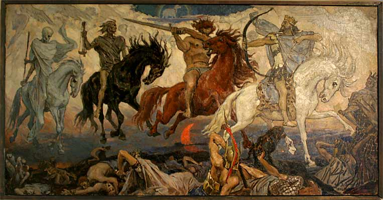 Васнецов Виктор Михайлович (Художник) "Апокалиптические всадники". Период создания: 1887 г. Материал, техника: масло, холст, дерево (подрамник) Размер: 72х136 см Место создания: — Номер в Госкаталоге: 2210845 Номер по ГИК (КП): КП-22326 Инвентарный номер: А-586-IV Местонахождение Федеральное государственное бюджетное учреждение культуры "Государственный музей истории религии"